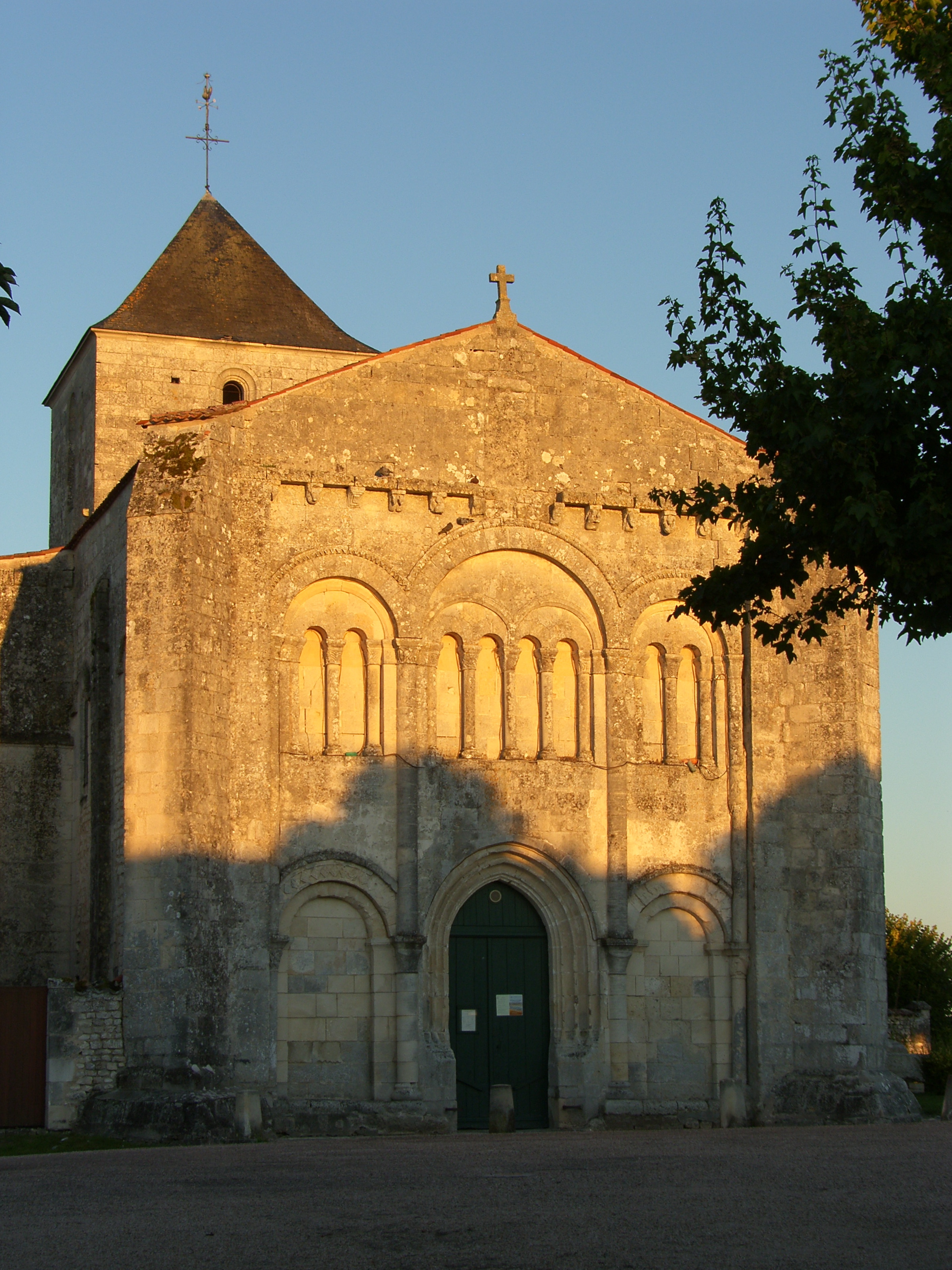 Eglise Saint-Sulpice de Montils (Charente-Maritime).